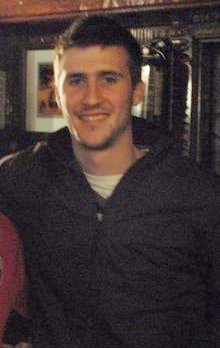 Oier Sanjurjo jokalariaren argazkia.